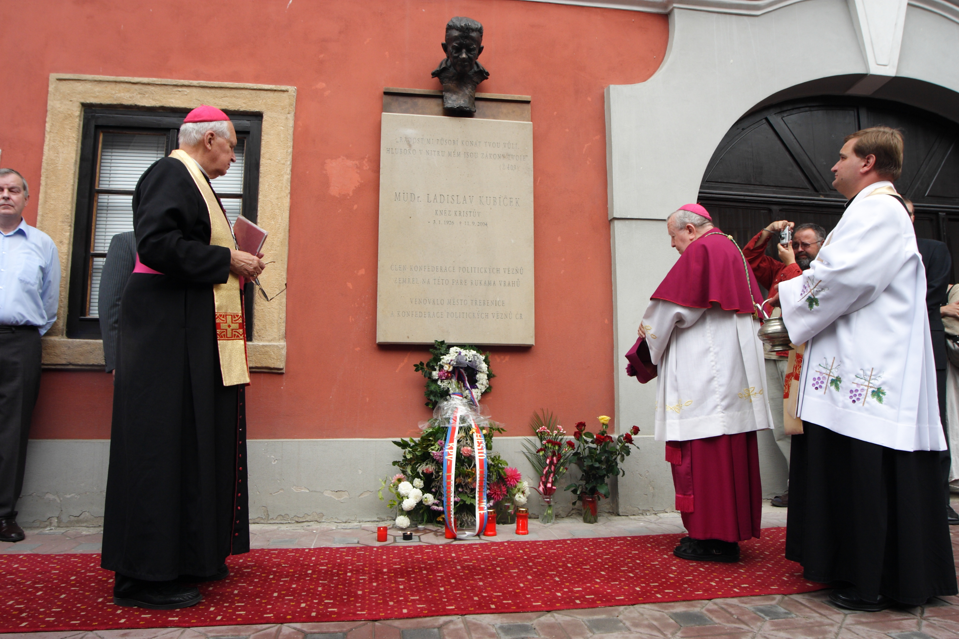 Odhalení pamětní desky zavražděnému P. MUDr. Ladislavu Kubíčkovi v den 1. výročí jeho úmrtí 11.9.2005. Vlevo biskup Mons. Prof. ThDr. Josef Koukl, vpravo biskup ThLic. Karel Otčenášek, PaedDr. h. c.